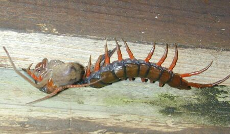 Ein Hundertfüßler greift eine Spinne an und frißt sie.